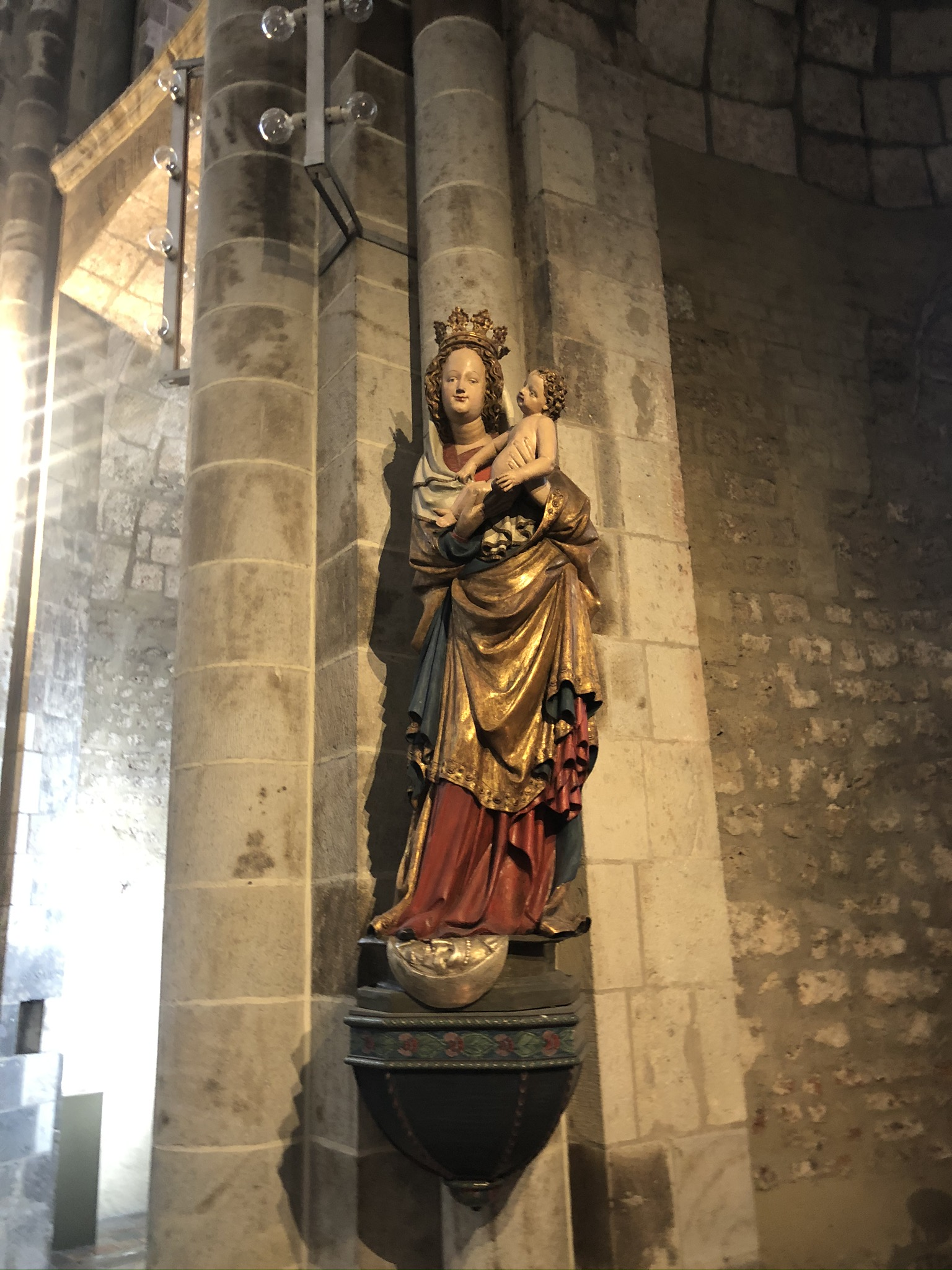 Mondsichelmadonna im Dekagon in St. Gereon, Köln